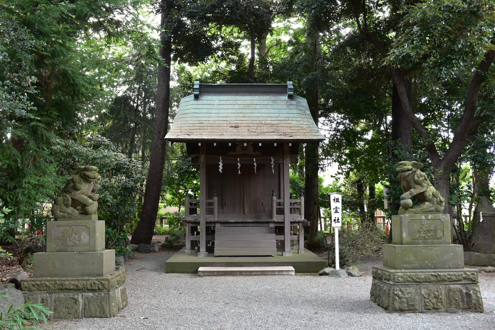 前鳥神社の境内社「祖霊社」